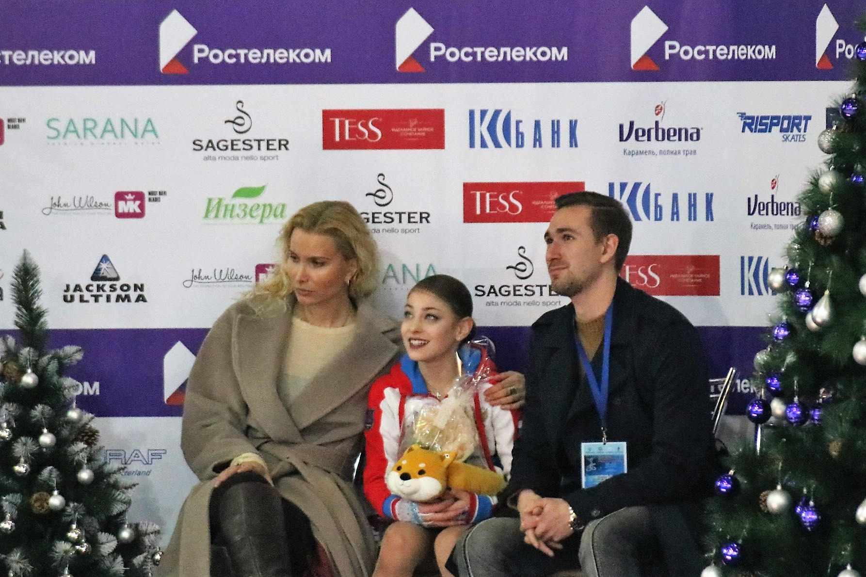 Алена Косторная на чемпионате России по фигурному катанию на коньках 2019